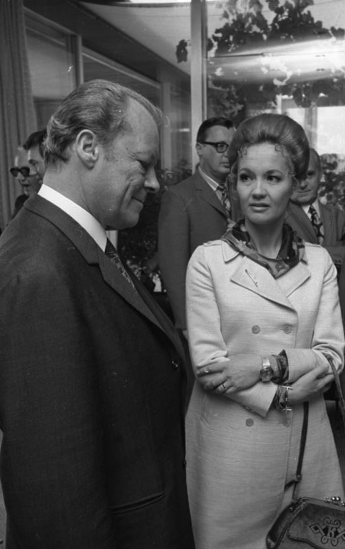 Bundeskanzler Willy Brandt empfängt Filmschauspieler